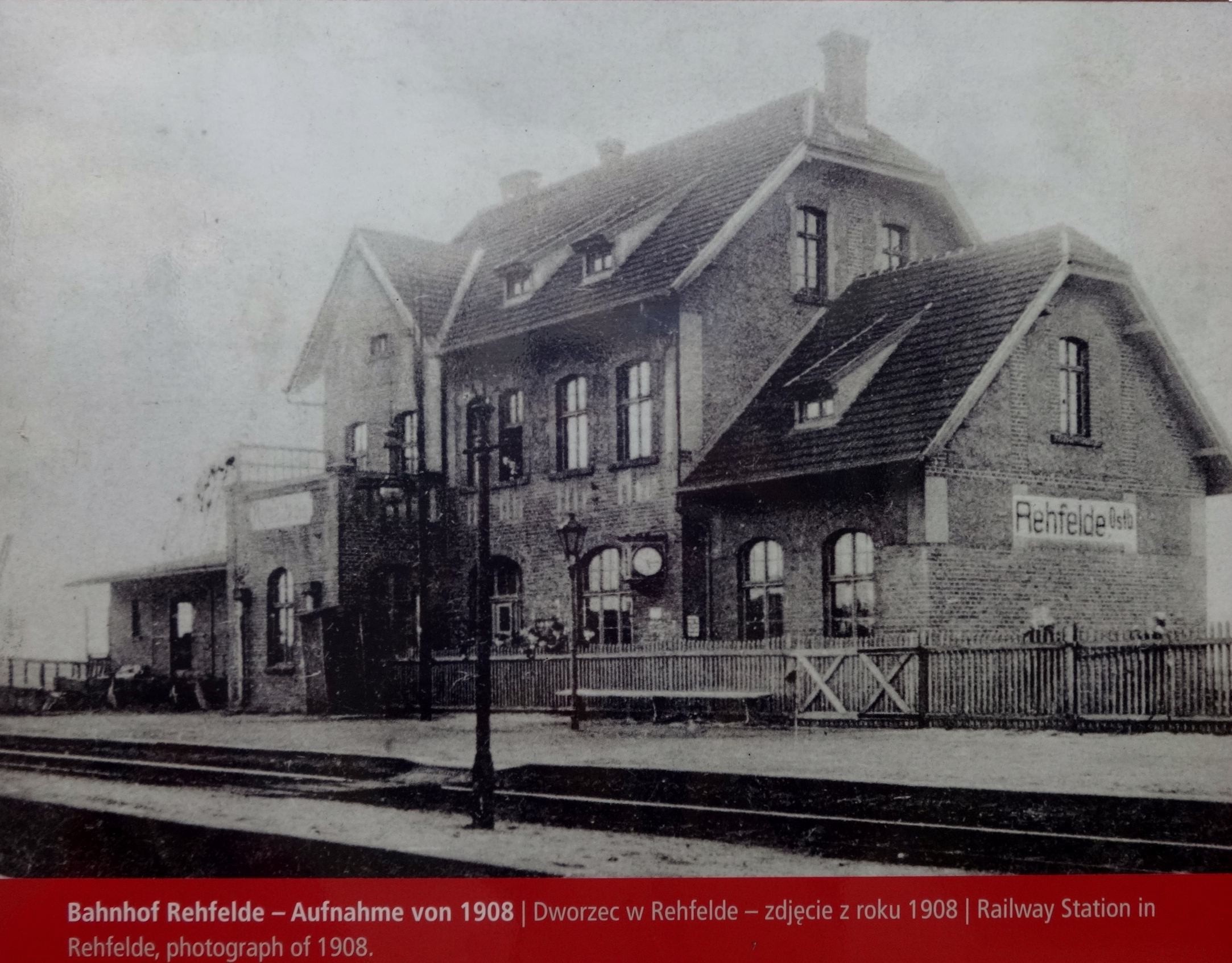 Aufnahme auf einer öffentlich zugänglichen Tafel am Bahnhof. Rehfelde ist eine Gemeinde im Landkreis Märkisch-Oderland in Brandenburg und ist Teil des Amtes Märkische Schweiz.